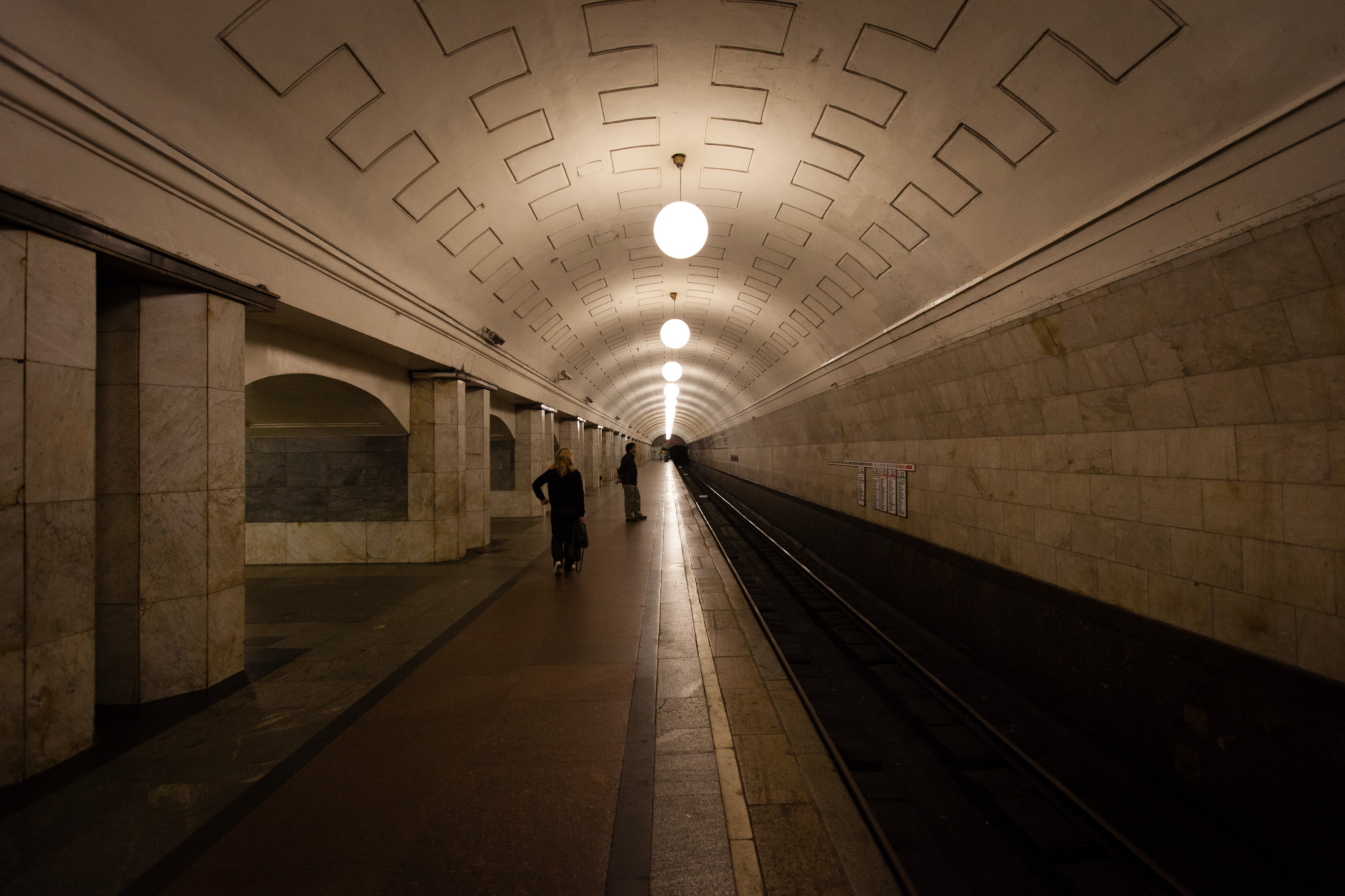 Moscow